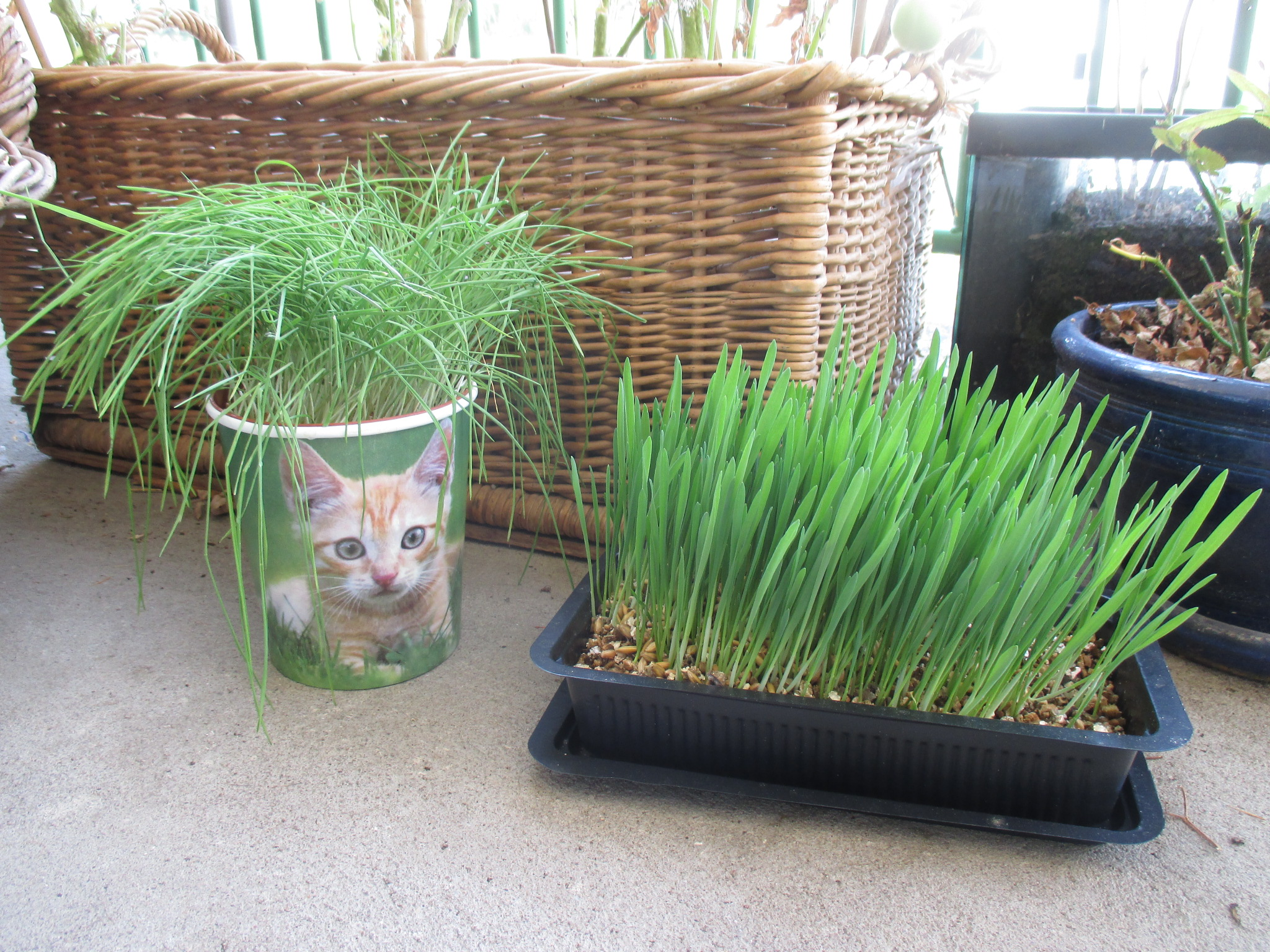 Herbe à chats